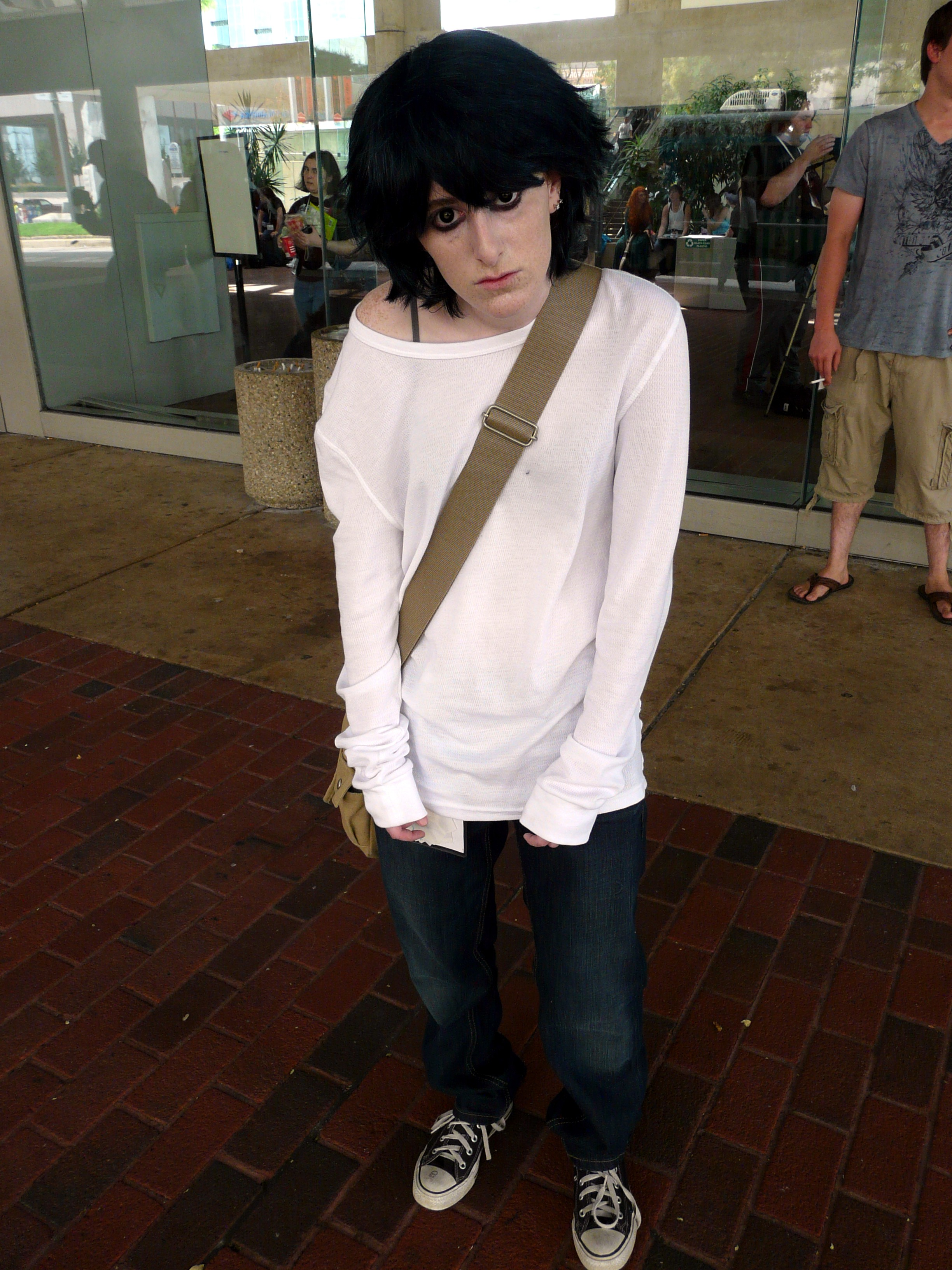 Otakon 2012 cosplay